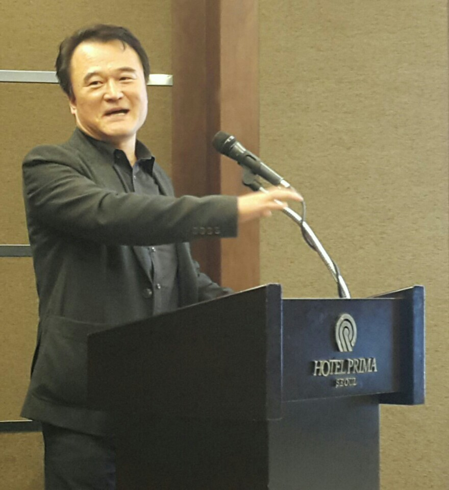 한국어 (조선): 인문학 강의 중인 황태영 회장